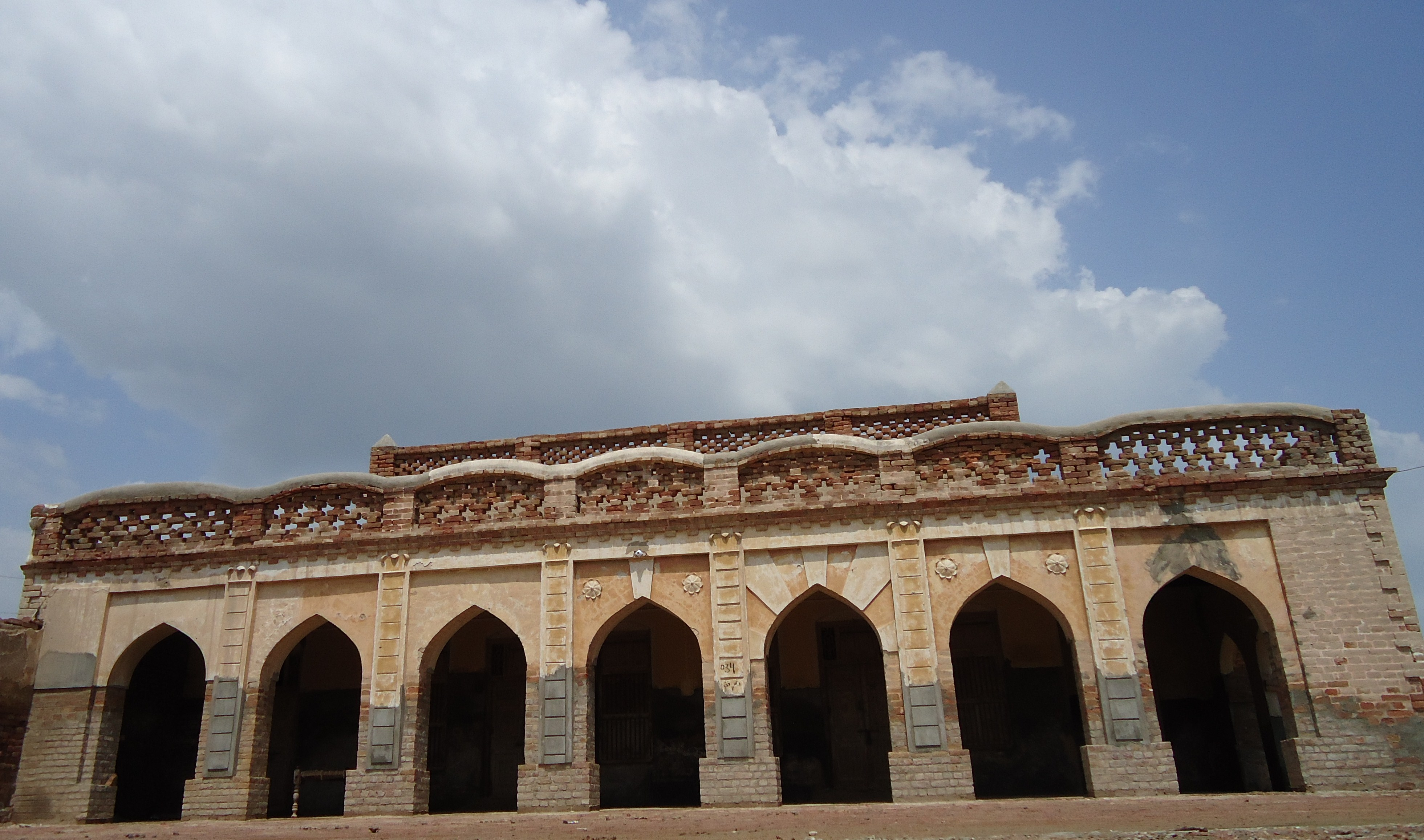 1936 Built Bungalow of Khan Sahib Shahal Khan Khoso in village Khan Sahib Shahal Khan in Deh Bachro Taluka Thul District Jacobabad